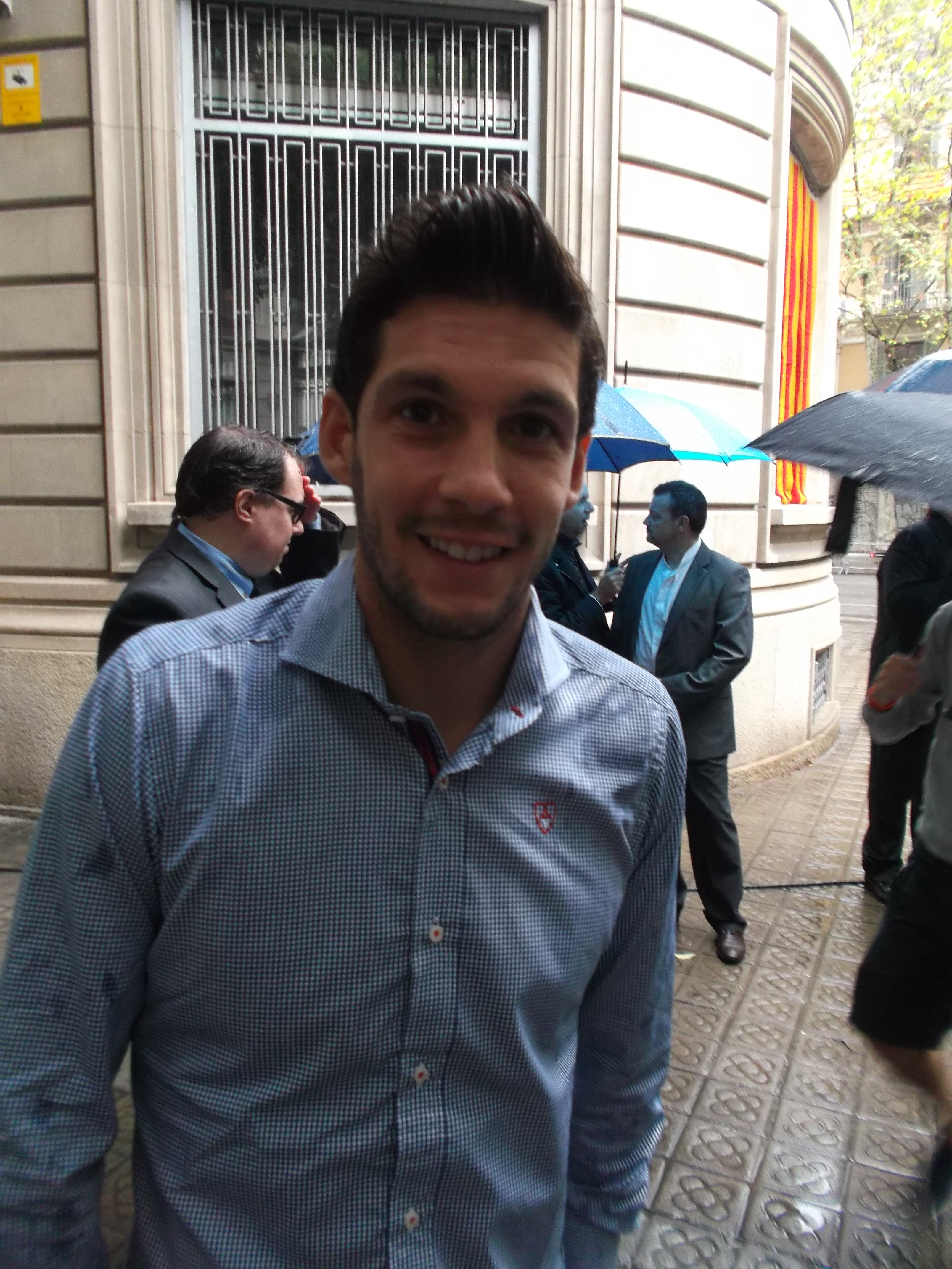 Javi Lopez 11/9/2013